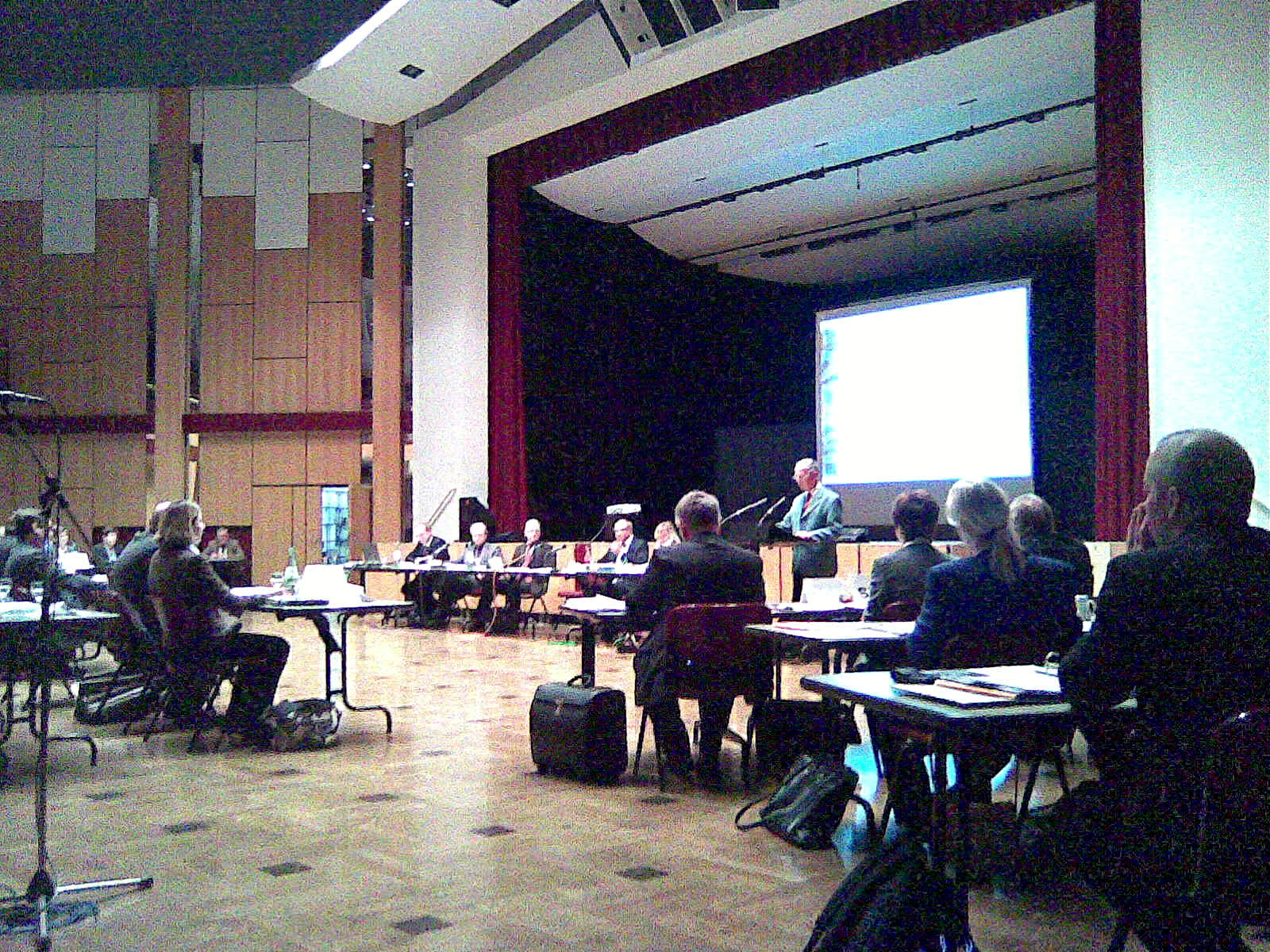 Blick in das Plenum des Northeimer Stadtrates während der konstituierenden Sitzung vom 10.11.2011. Im Bild sind vorn die Fraktionen der SPD und der Grünen zu sehen. Alterspräsident Dr. Thilo Rumann (BfN) eröffnet die Wahlperiode 2011-2016.